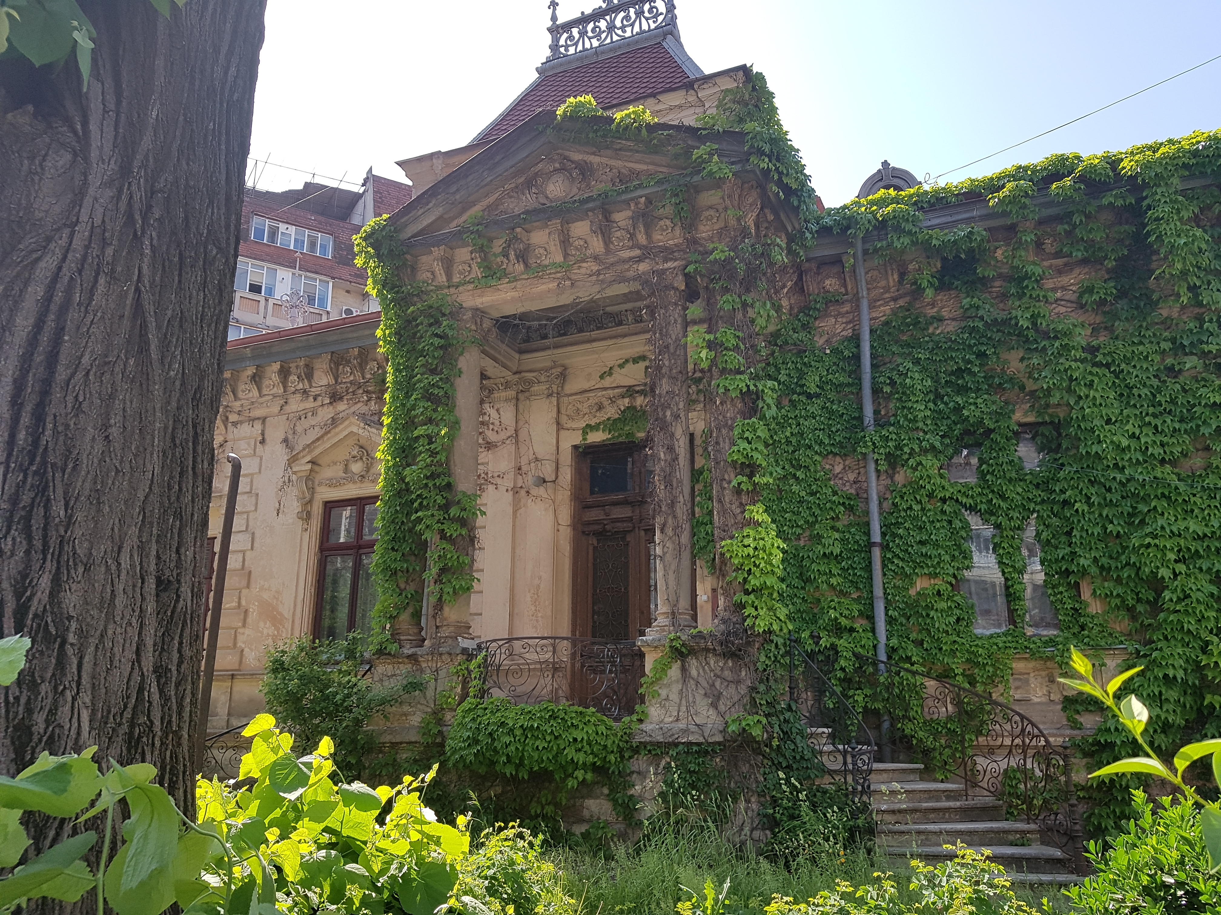 Casa Lăzărică Petrescu